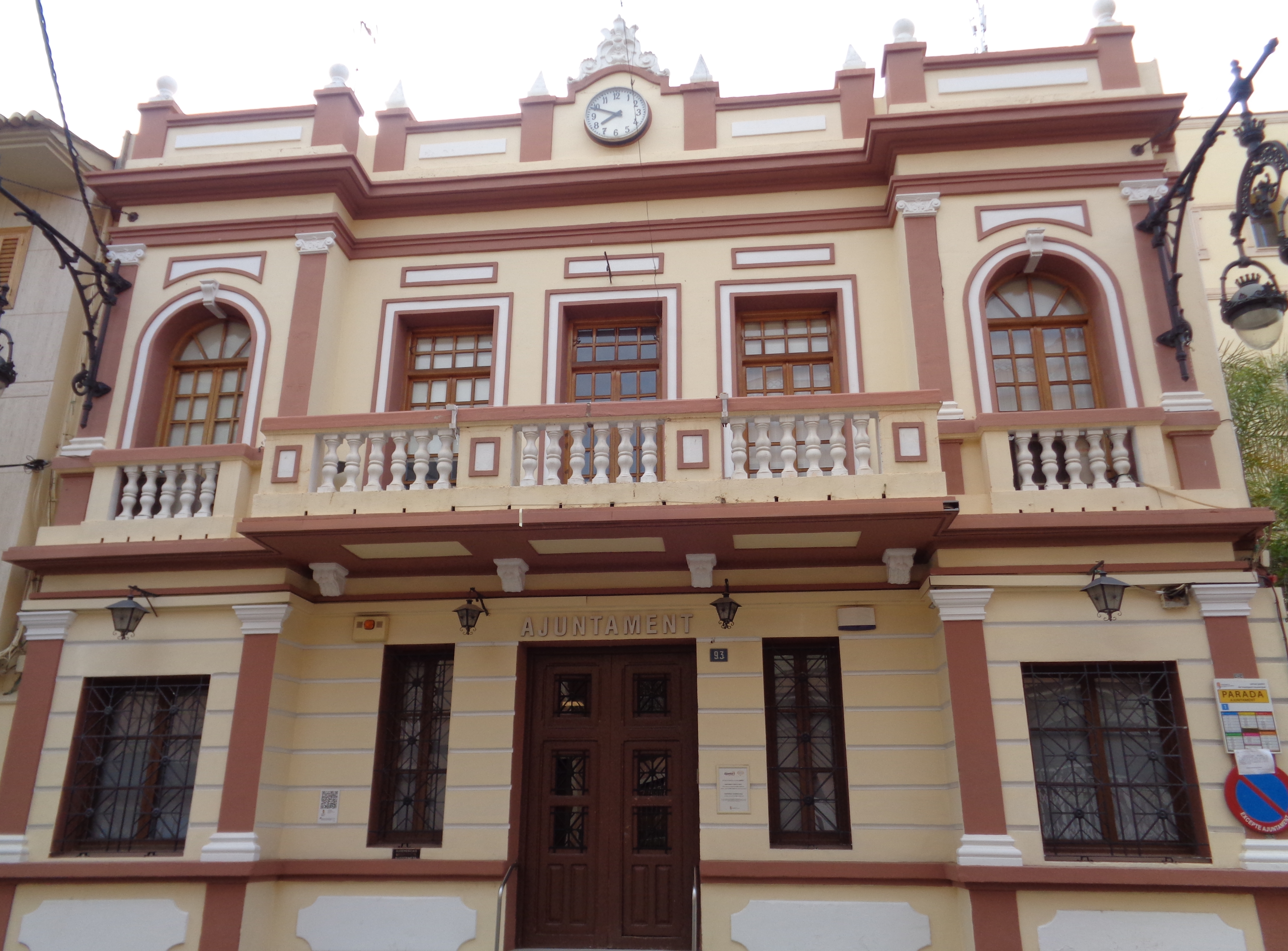 La Pobla de Vallbona.